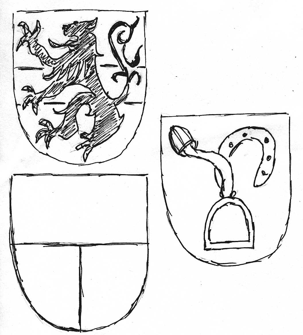 Wappen der drei Linien der Familie von Emmendorfer, Ministerialengeschlecht der Eichstätter Bischöfe.